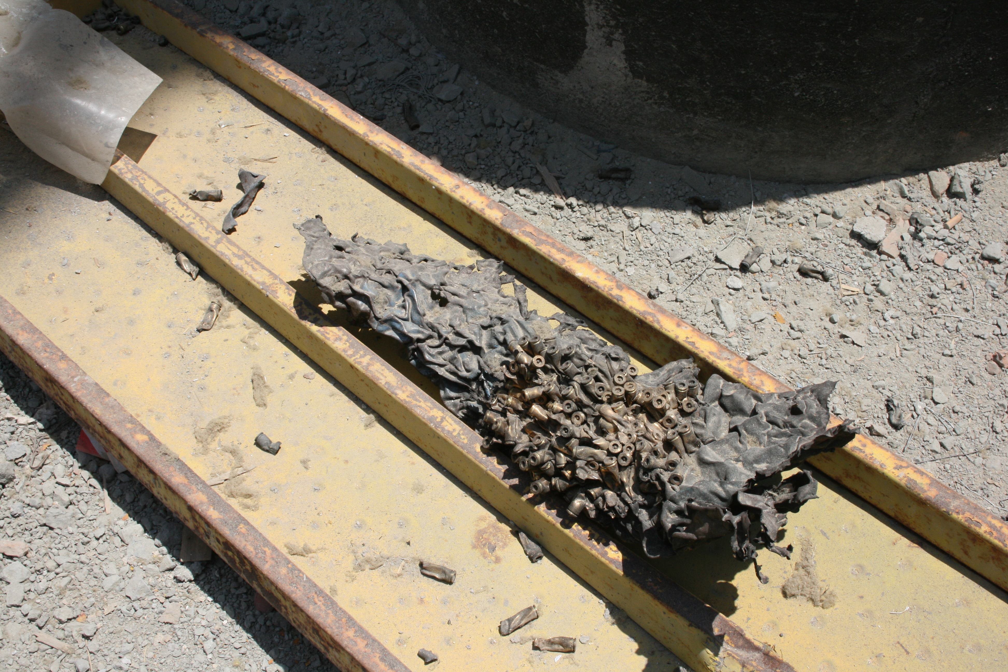 ארגז תחמושת שהועף וניתך. תוצאות הפיצוץ בבסיס הימי אוונגלוס פלורקיס בקפריסין